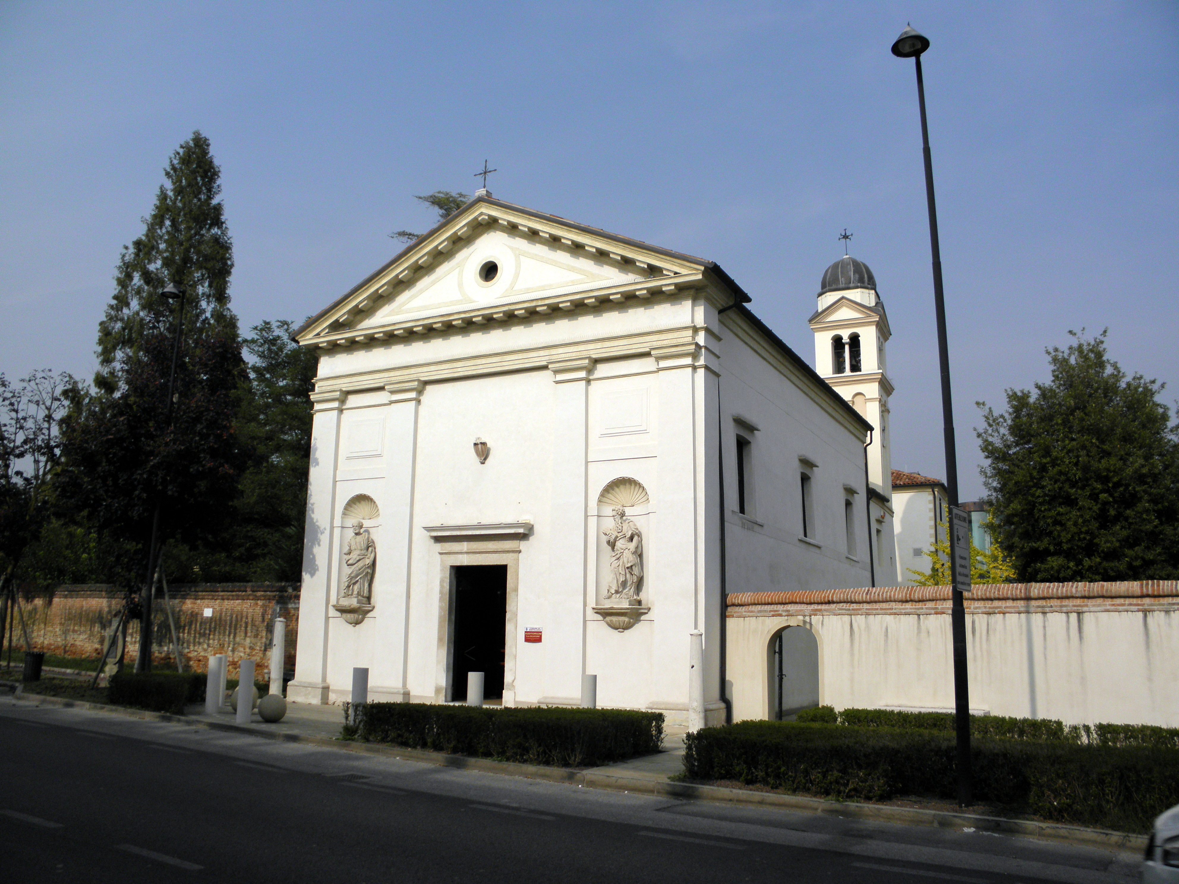 Martellago, ex chiesetta ed ora Auditurium del Santissimo Salvatore.